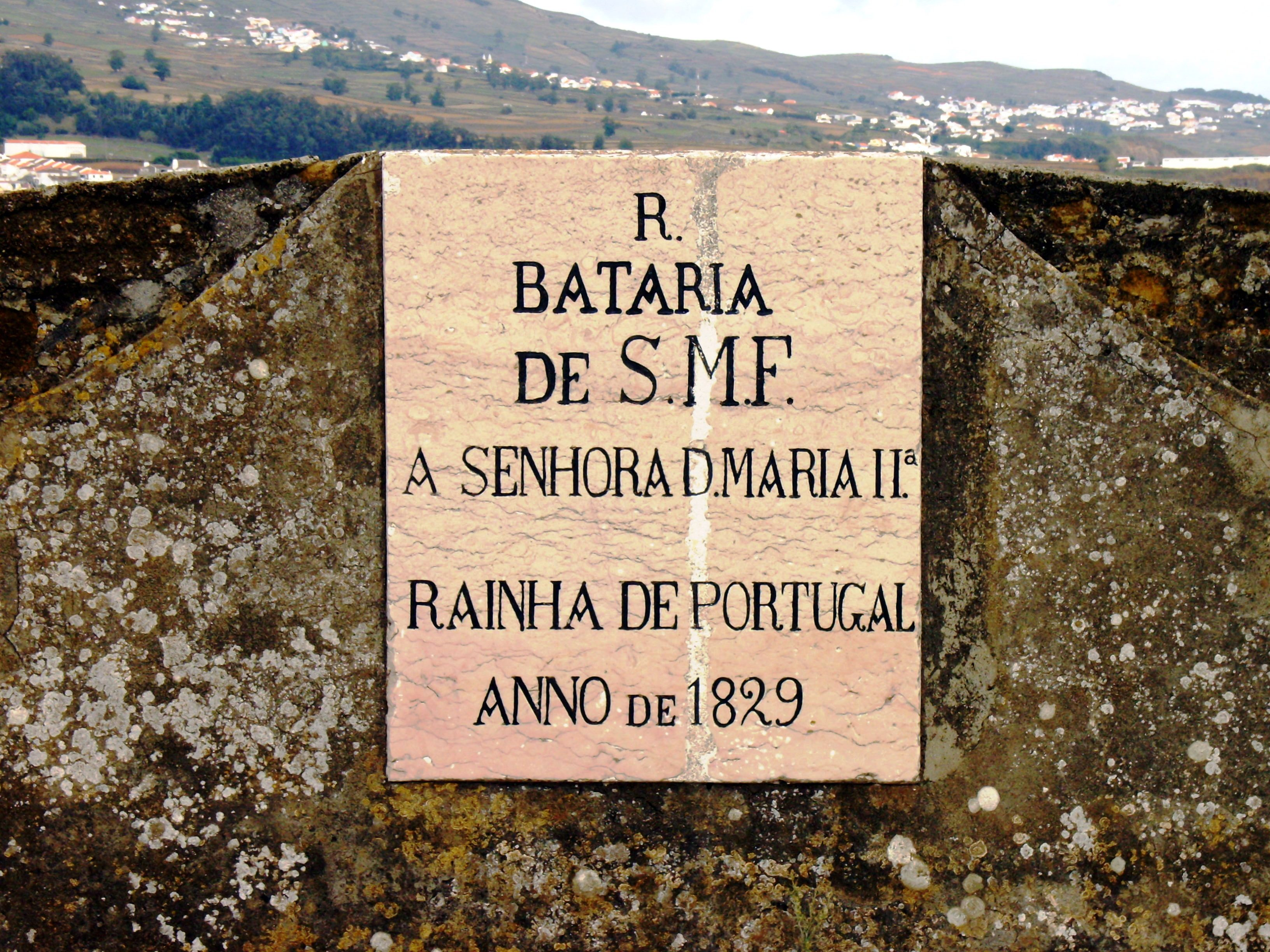 Fortaleza de São João Baptista do Monte Brasil, Angra do Heroísmo, ilha Terceira, Açores: Bateria de D. Maria II.